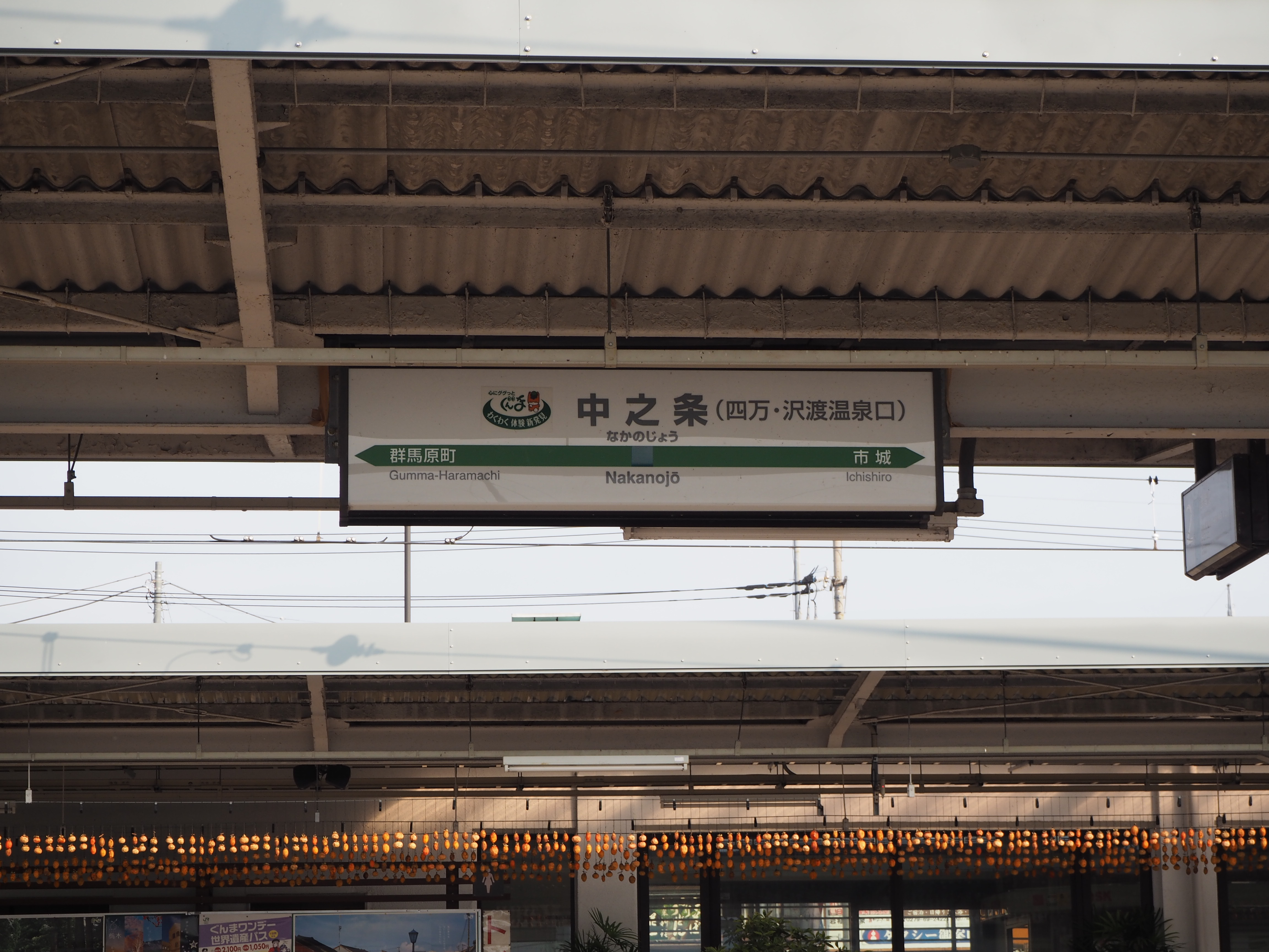 中之条駅駅名標。「四万・沢渡温泉口」と記載されている。その下に1番ホーム屋根に吊るした干し柿が見える。